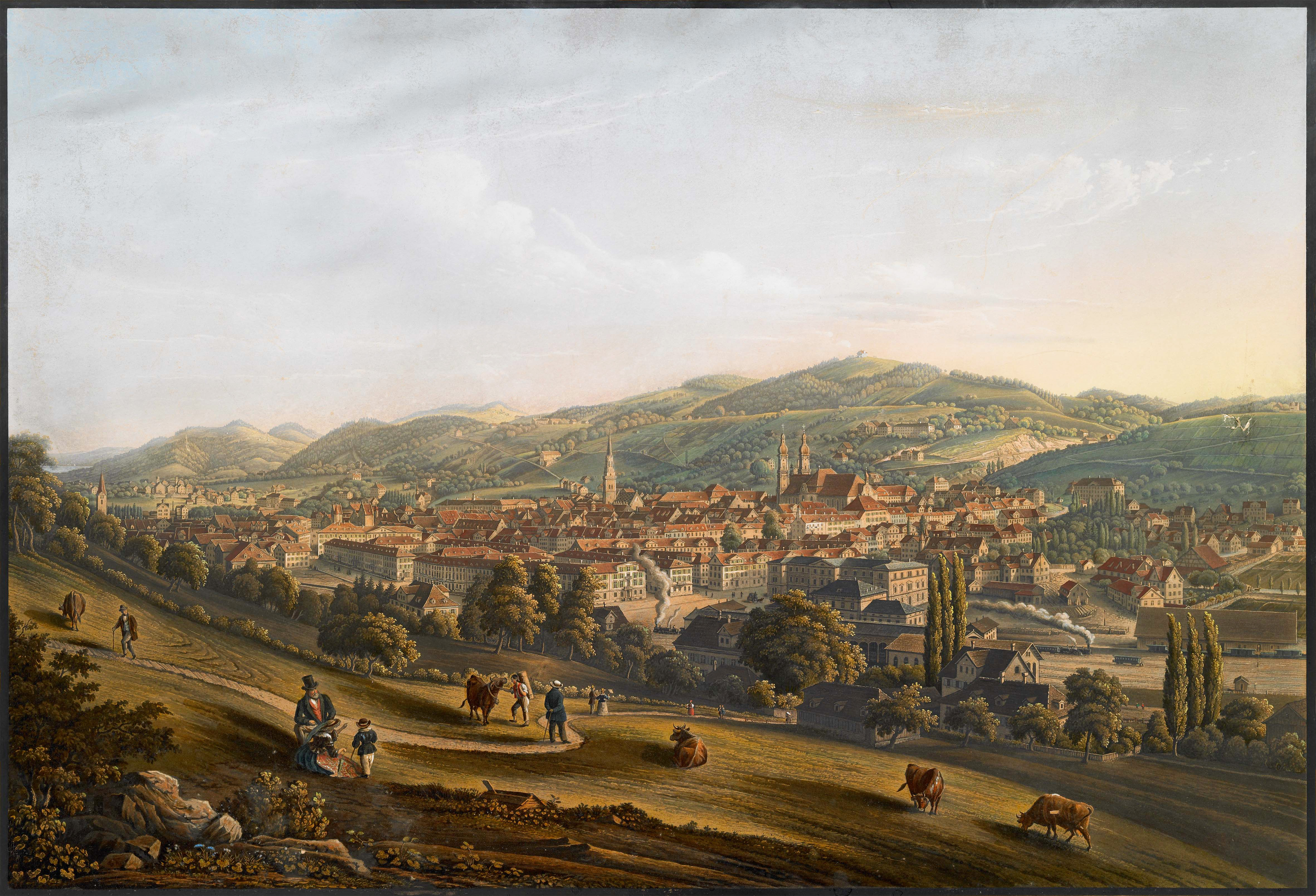 Ansicht vom Rosenberg auf St.Gallen. Stich von Johann Baptist Isenring 1856 im Historischen Museum St. Gallen